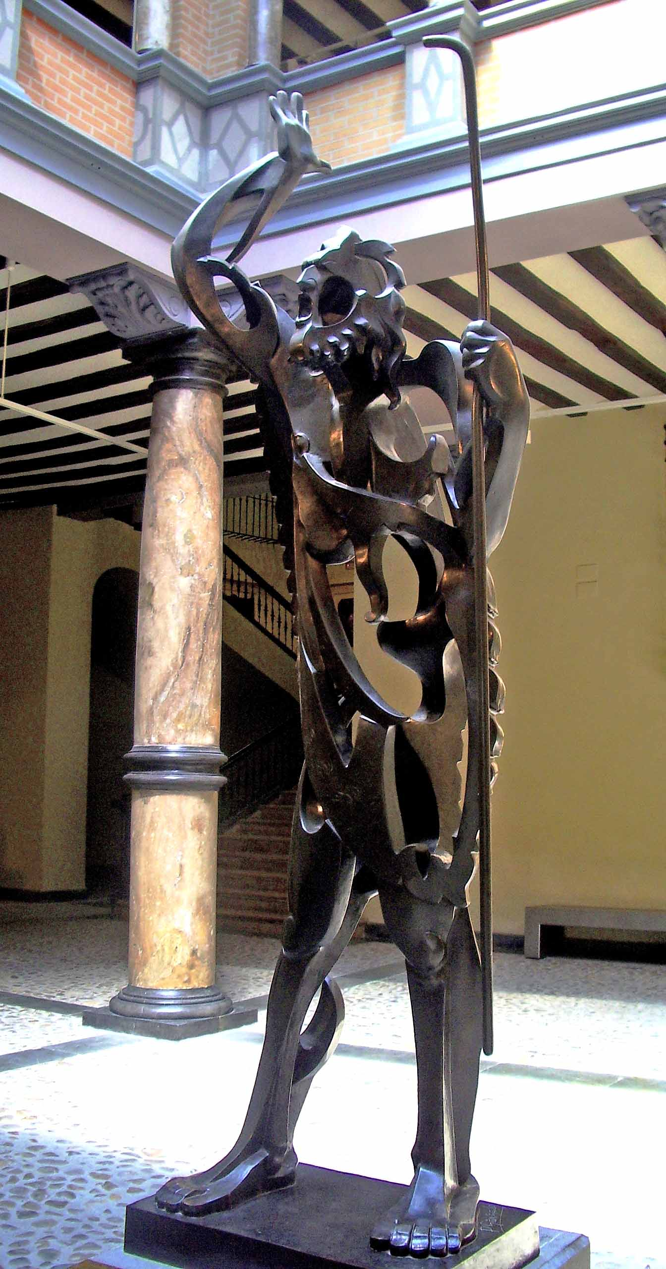 El Profeta (1933), de Pablo Gargallo